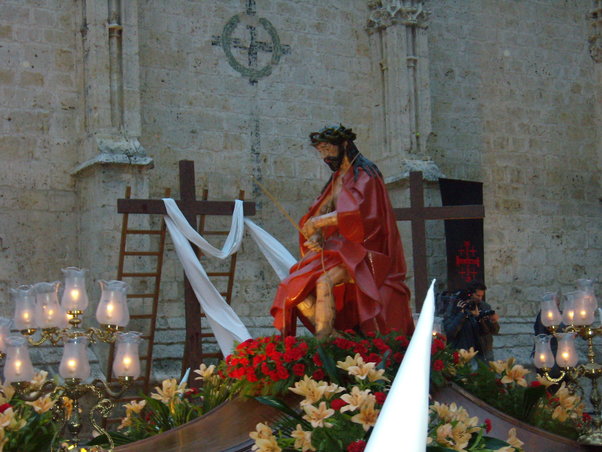 Coronación de Espinas, siglo XVII. Semana Santa de Palencia.